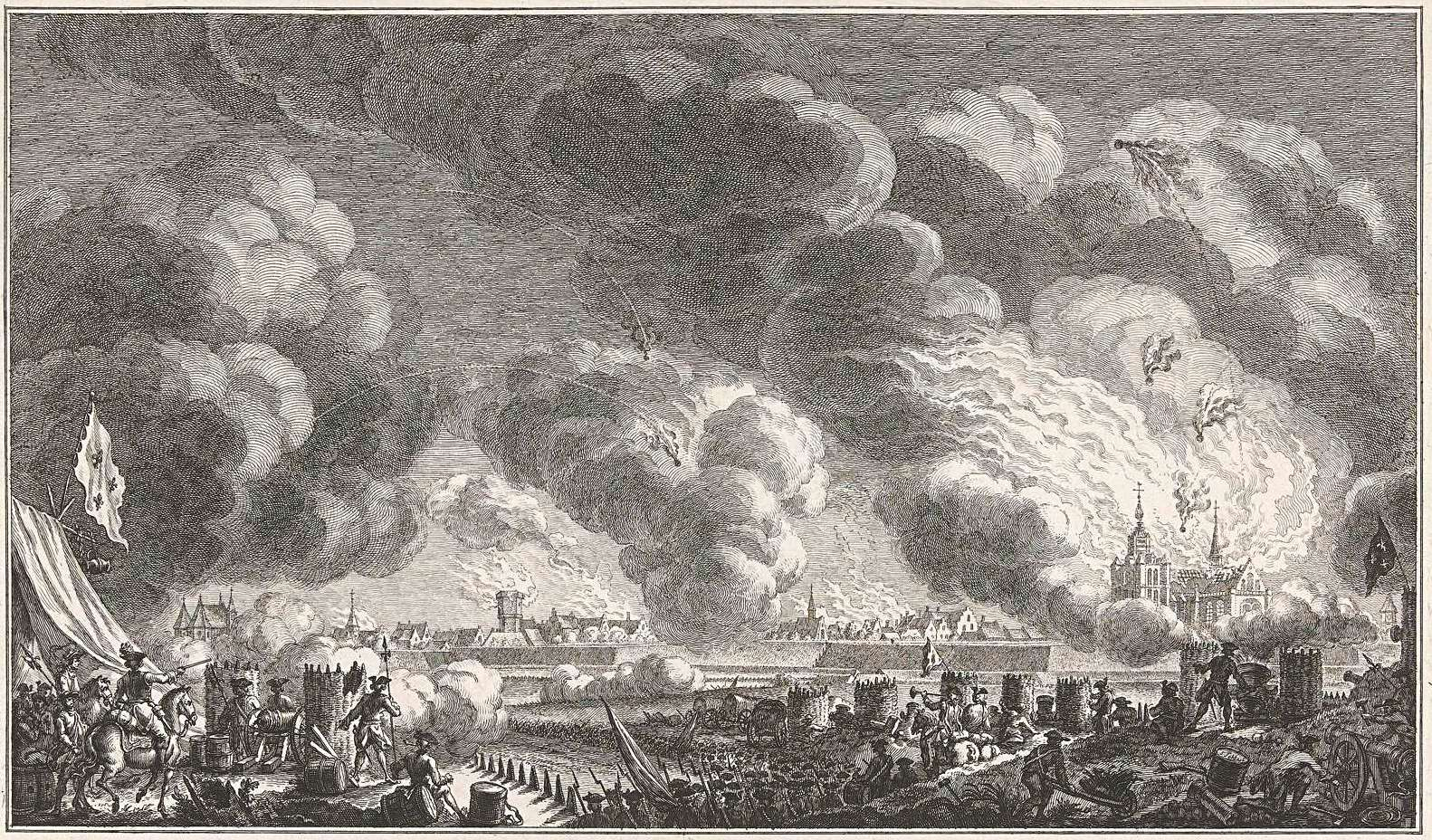 Guerre de Succession d'Autriche. Vue générale du siège de Berg op Zoom en 1747 par l'armée française. Bombardement de la forteresse.